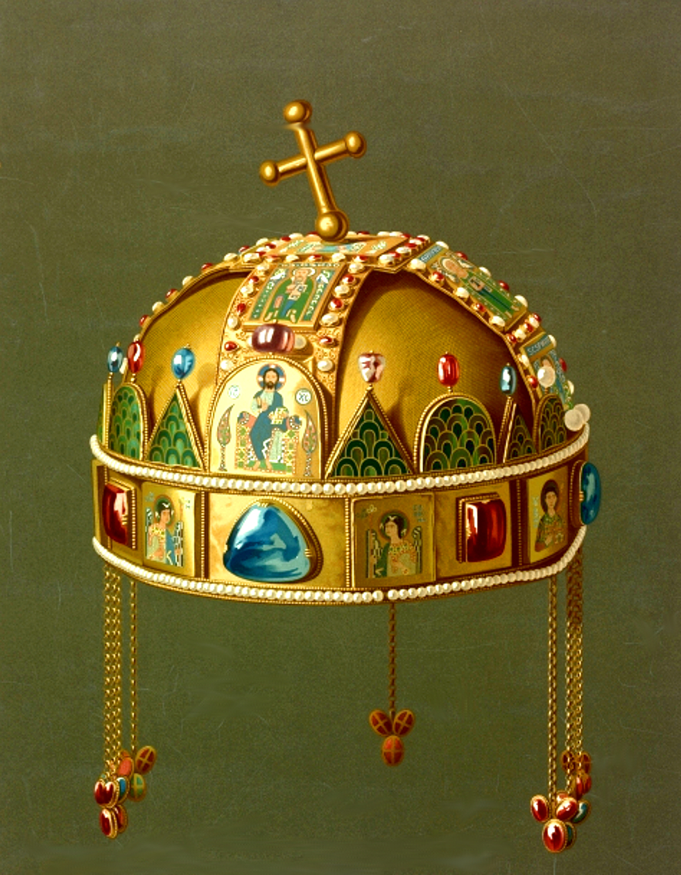 Ungarische Königskrone A MAGYAR SZENT KORONA LA SAINTE COURONNE DE HONGRIE Farblithografie nach einem Gemälde von Lajos Rauscher (1881)